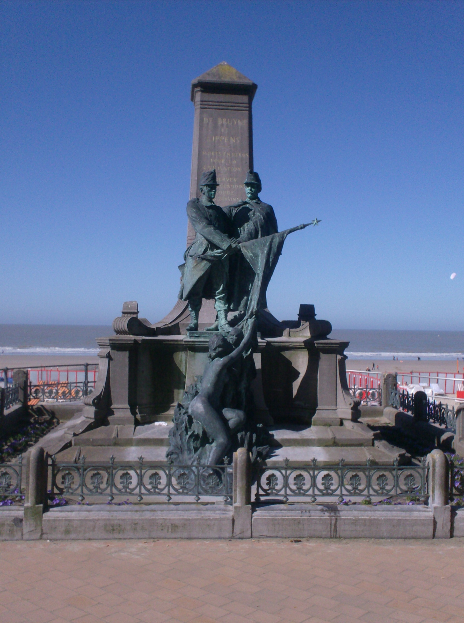 Monument van Lippens en De Bruyne op de zeedijk in Blankenberge (België) door Guillaume Charlier